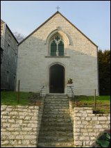 foto van op de openbare weg. Maria Magdalenakapel in Gobertange, Malen, Geldenaken